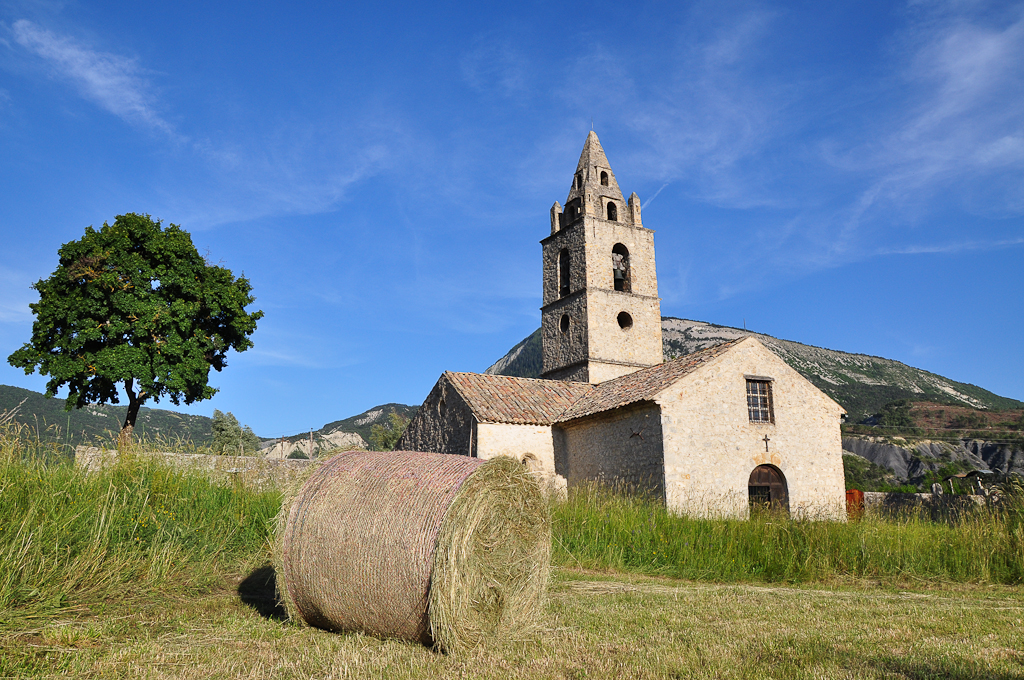 Église de Tartonne